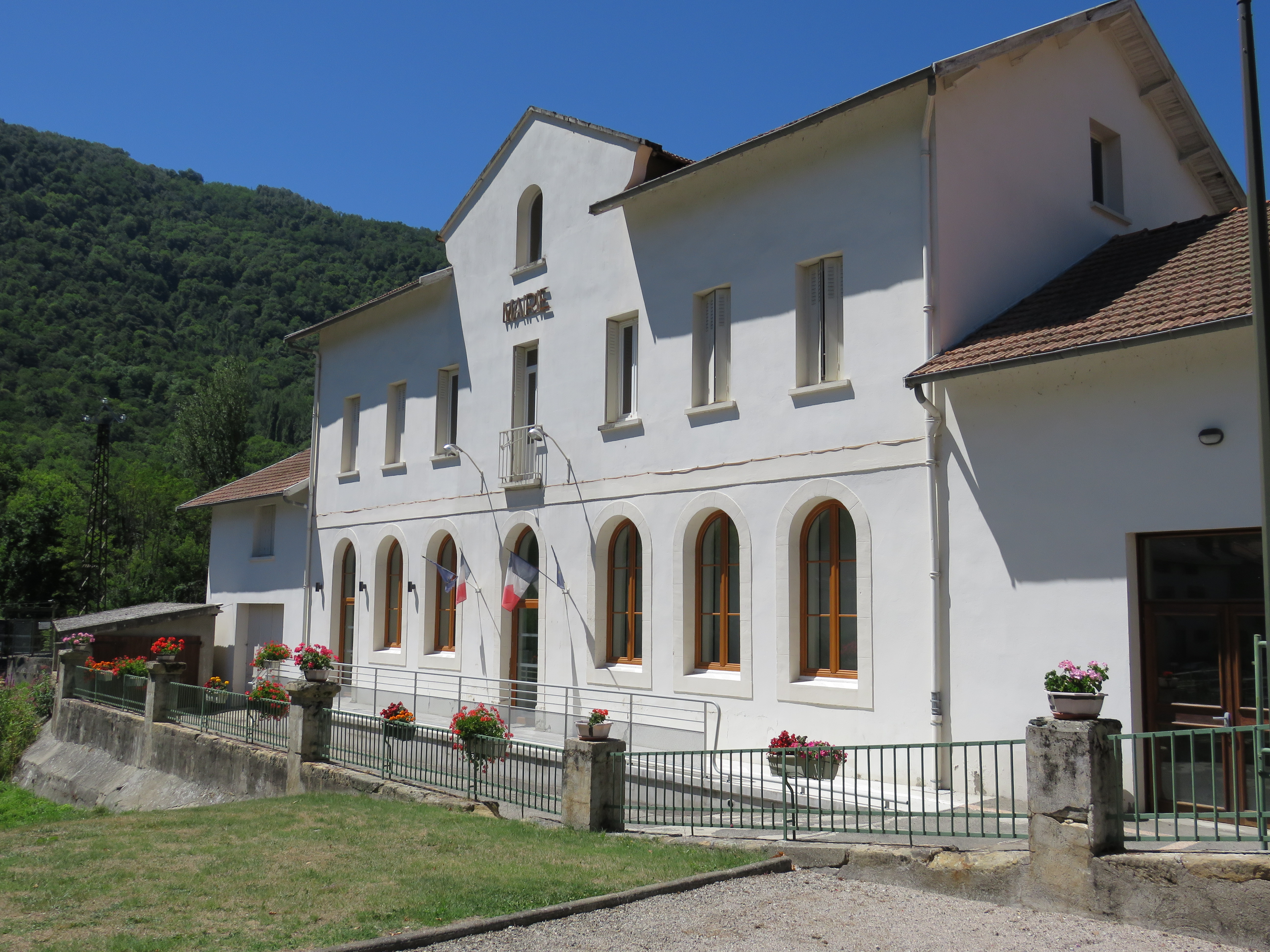 Mairie d'Albliès. Photo sans date incrustée.